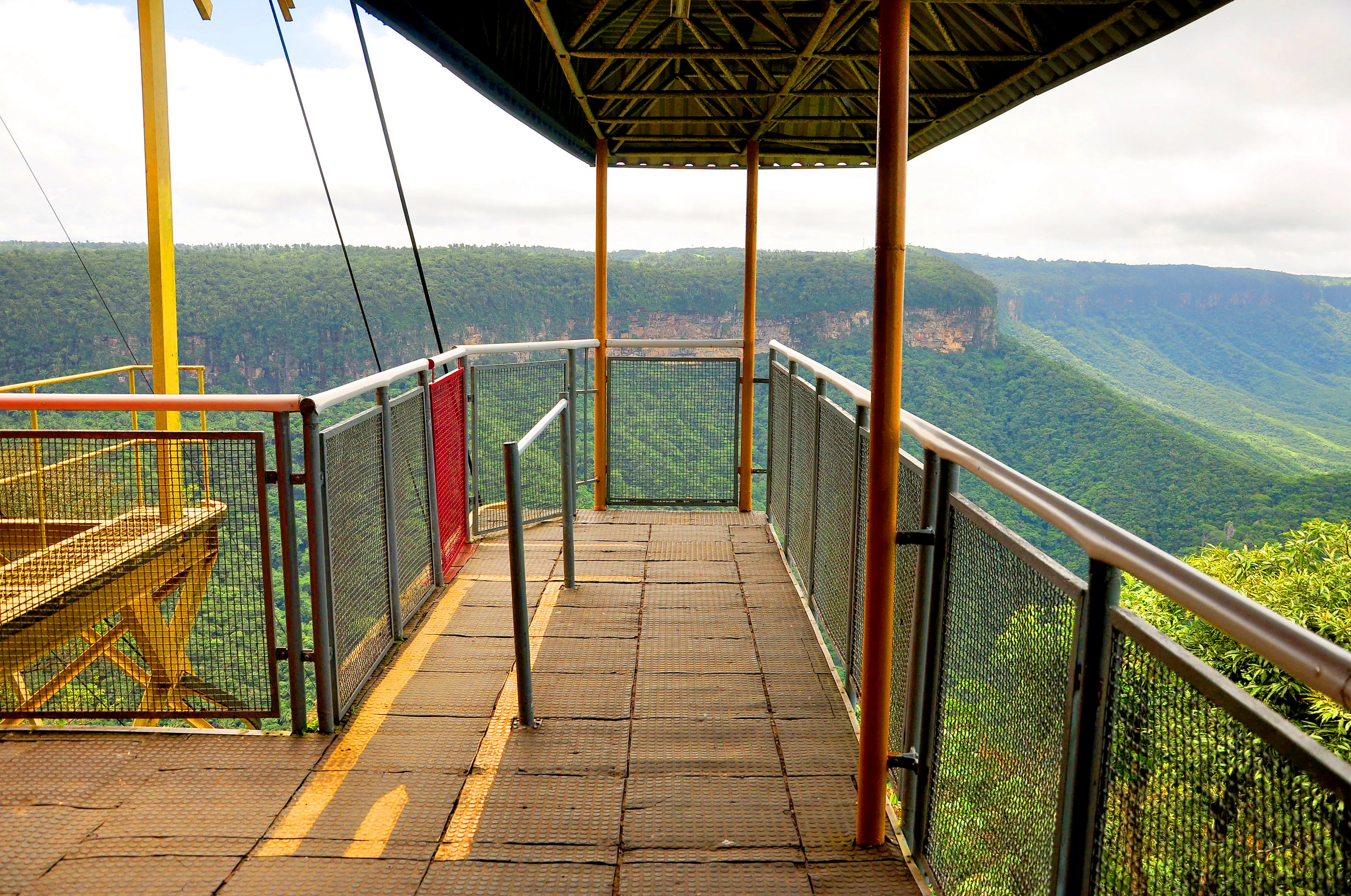 Fotos feitas no âmbito de Ubajara/Ce